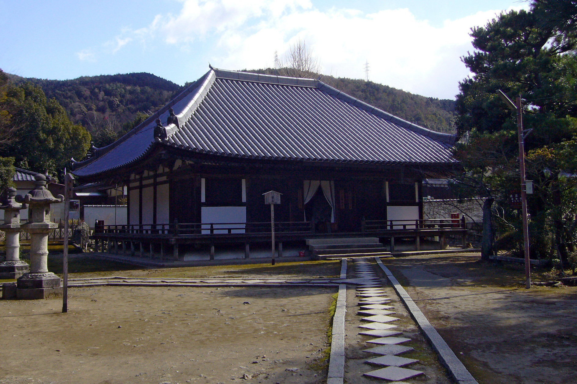 Hokaiji in Kyoto, Japan